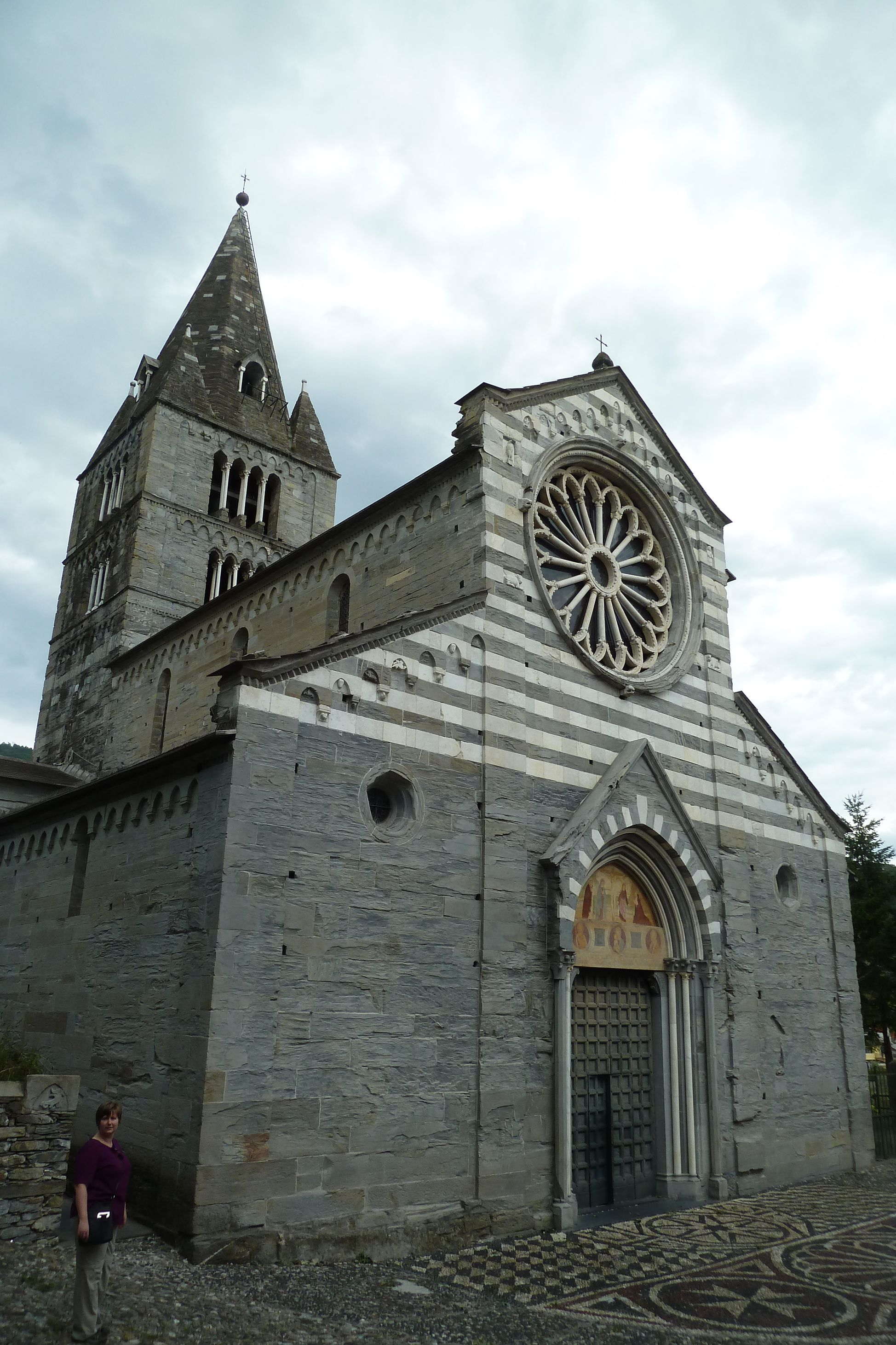 by